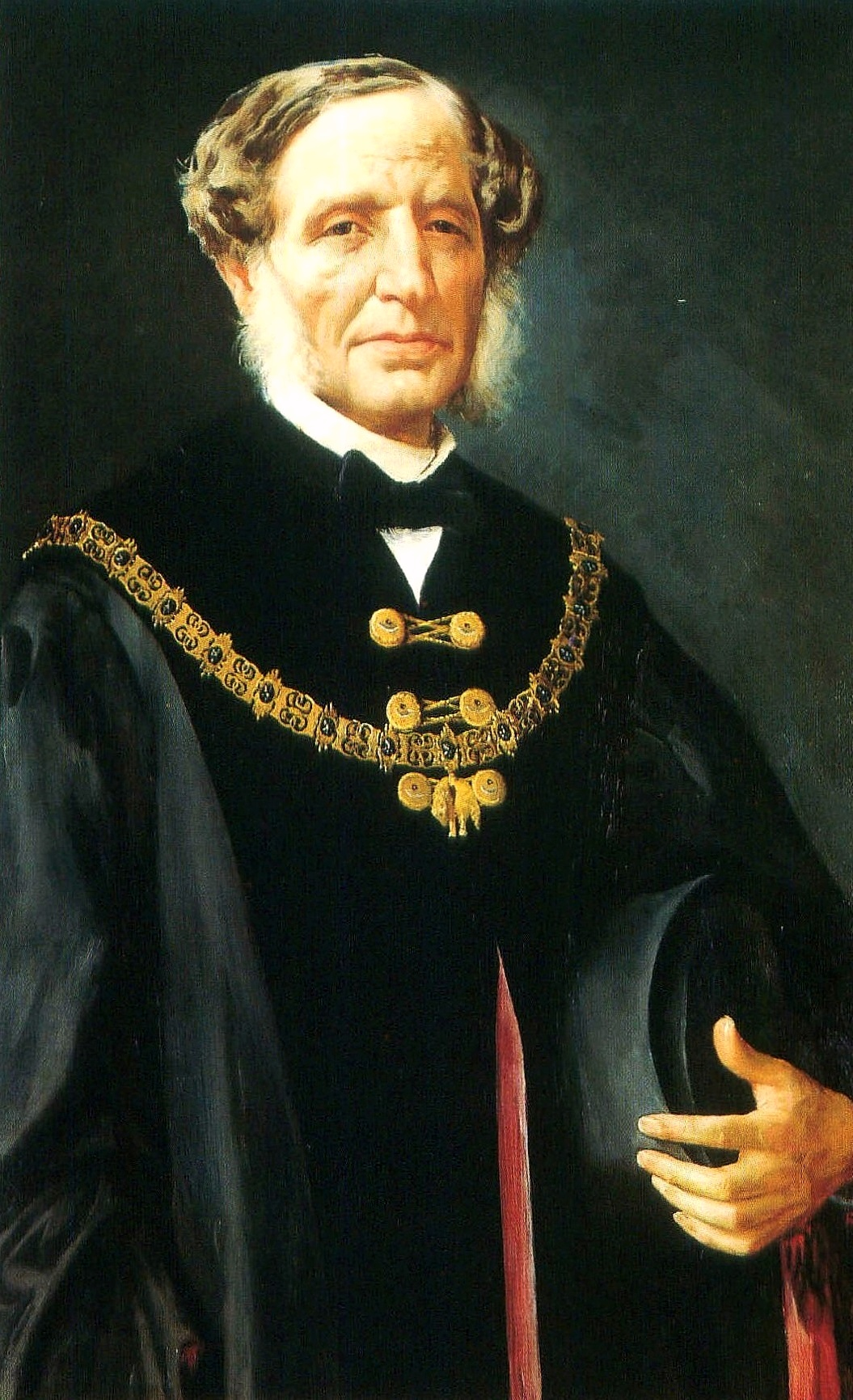 Retrato del político español Manuel Seijas Lozano (1800-1868).